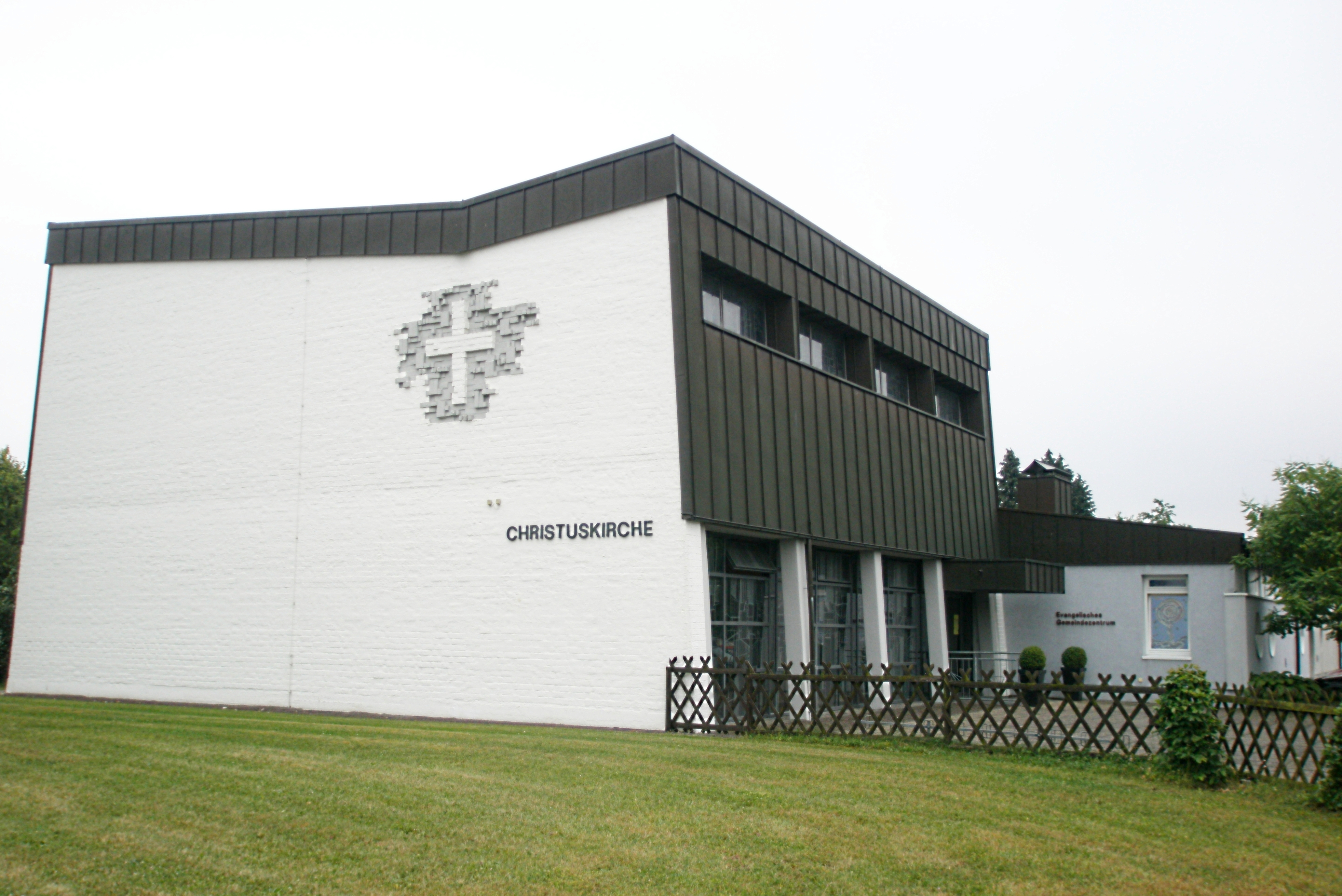 Evangelische Kirchenge Rülzheim